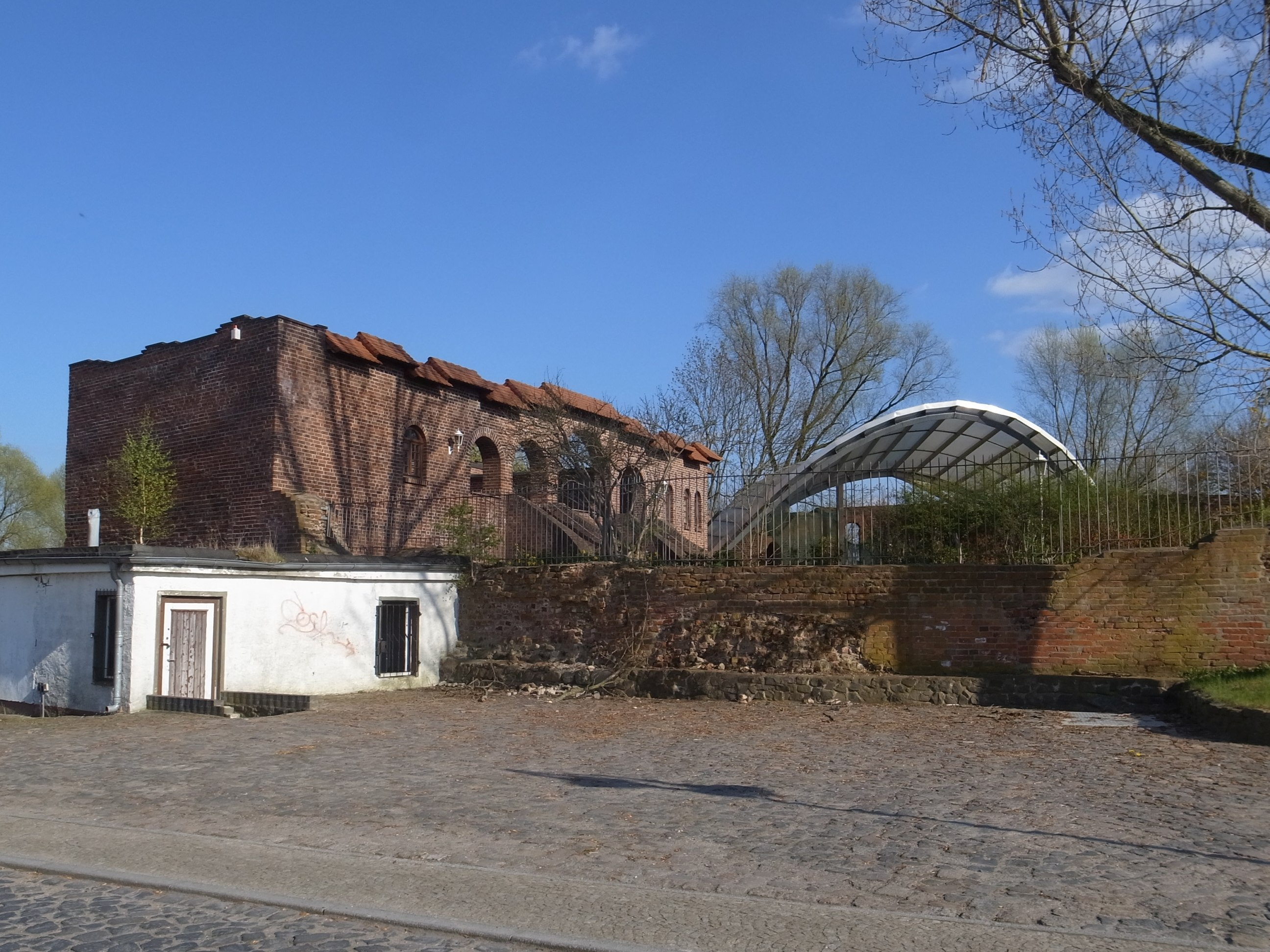 Gräfenhainichen, Schlossruine mit Freilichtbühne